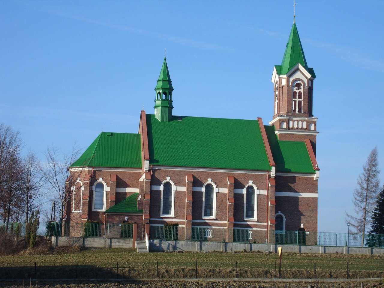 Niebieszczany - kościół św. Mikołaja